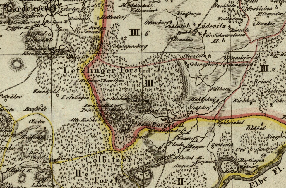 Der Kanton Burgstall im Distrikt Salzwedel des Departement der Elbe (Königreich Westphalen) von 1812